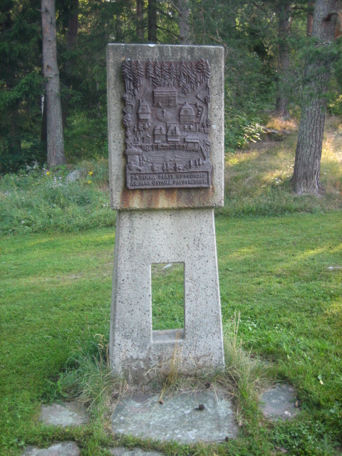 Minnessten över Östanå Pappersbruk, ca 2 km öster om Iggesund